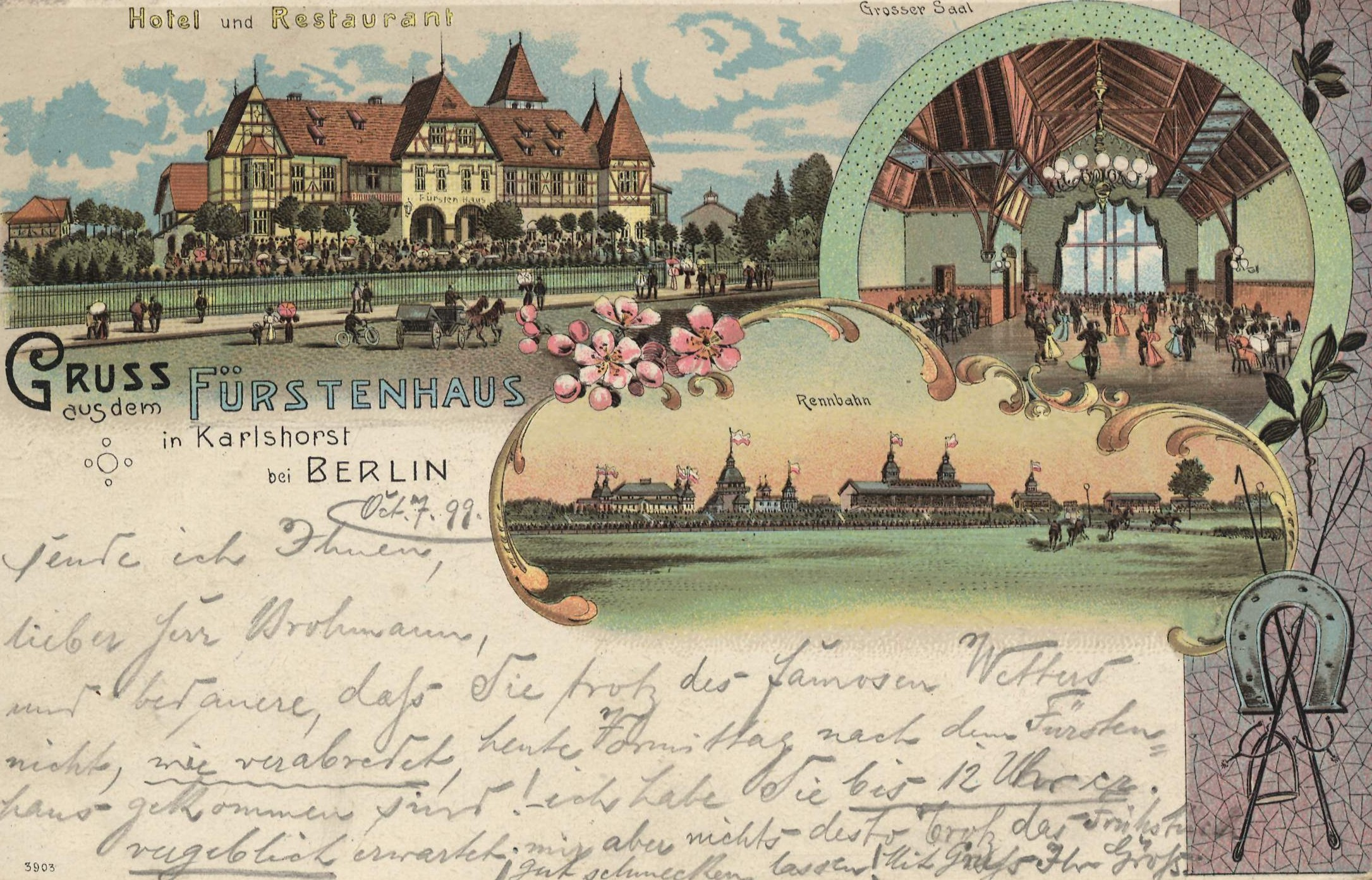 Restaurant und Hotel Fürstenhof an der Rennbahn in Karlshorst